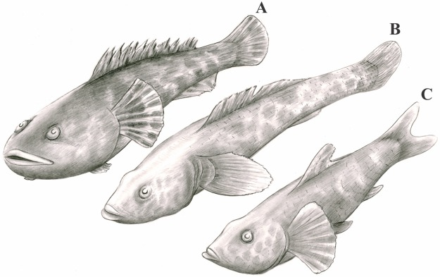 Artistic reconstruction of two extant benthic fish and of †Sorbinicharax verraesi. A, toadfish (Batrachoides sp.); B, goby (Neogobius sp.); C, †Sorbinicharax verraesi.